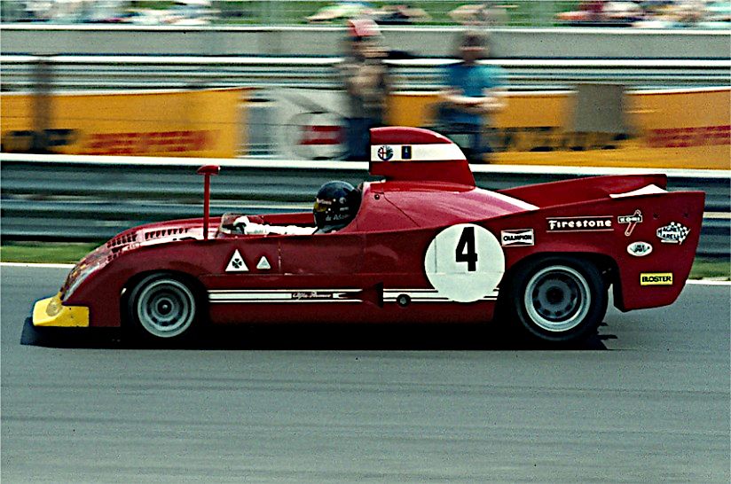 Bildbeschreibung: Andrea de Adamich auf Alfa Romeo 33TT12 Fotograf: Lothar Spurzem Datum: 19.05.1974 Nürburgring, eingangs Nordkurve Sonstiges: 1000-km-Rennen, 3. Platz (zusammen mit Carlo Facetti)